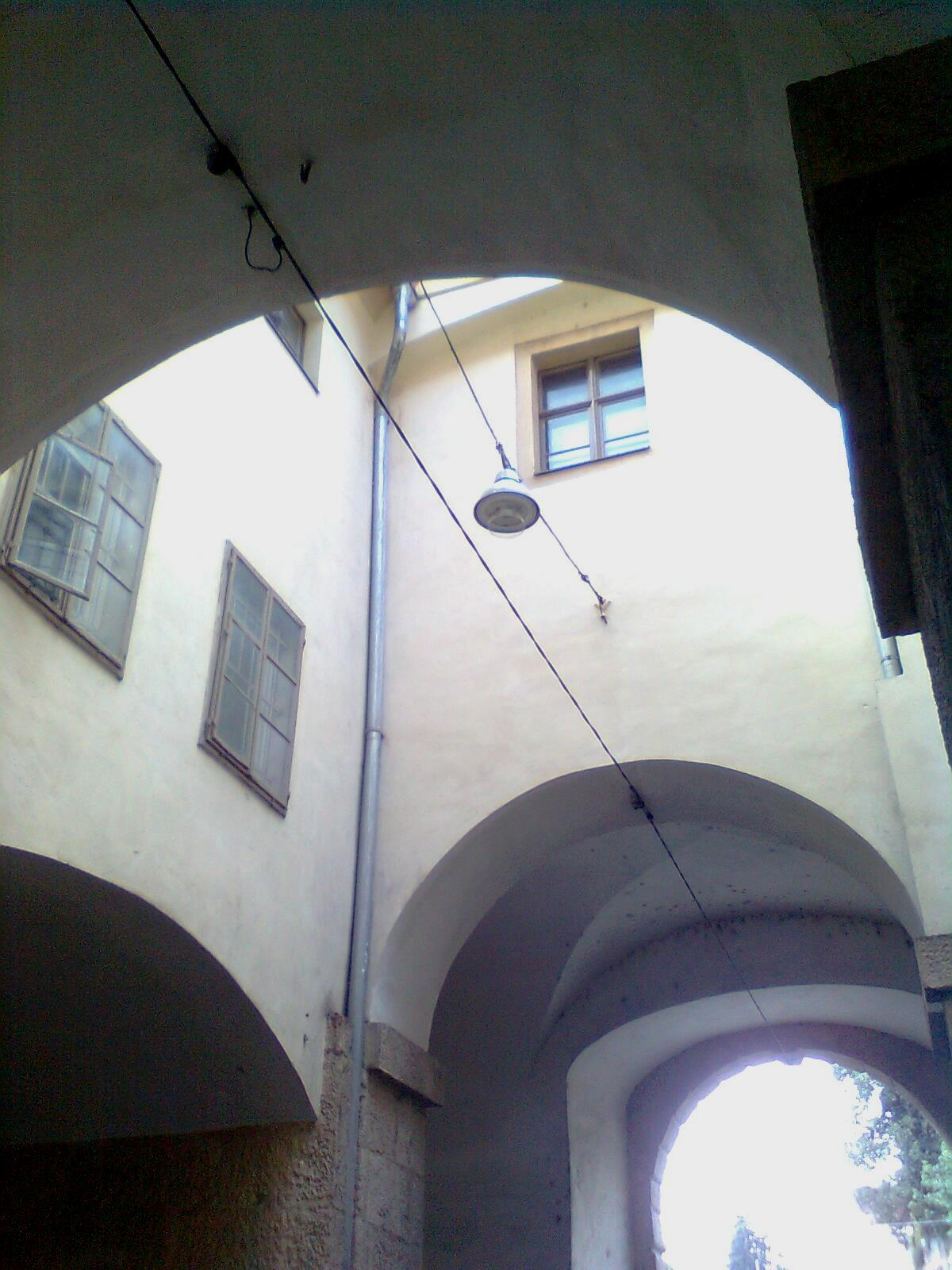 Paulustor, Graz, Innengewölbe